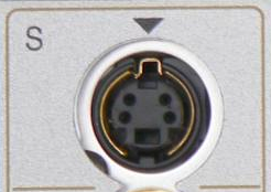 Eigene Photographie